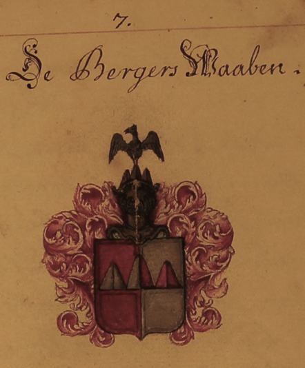 Coat of arms of the Berg family